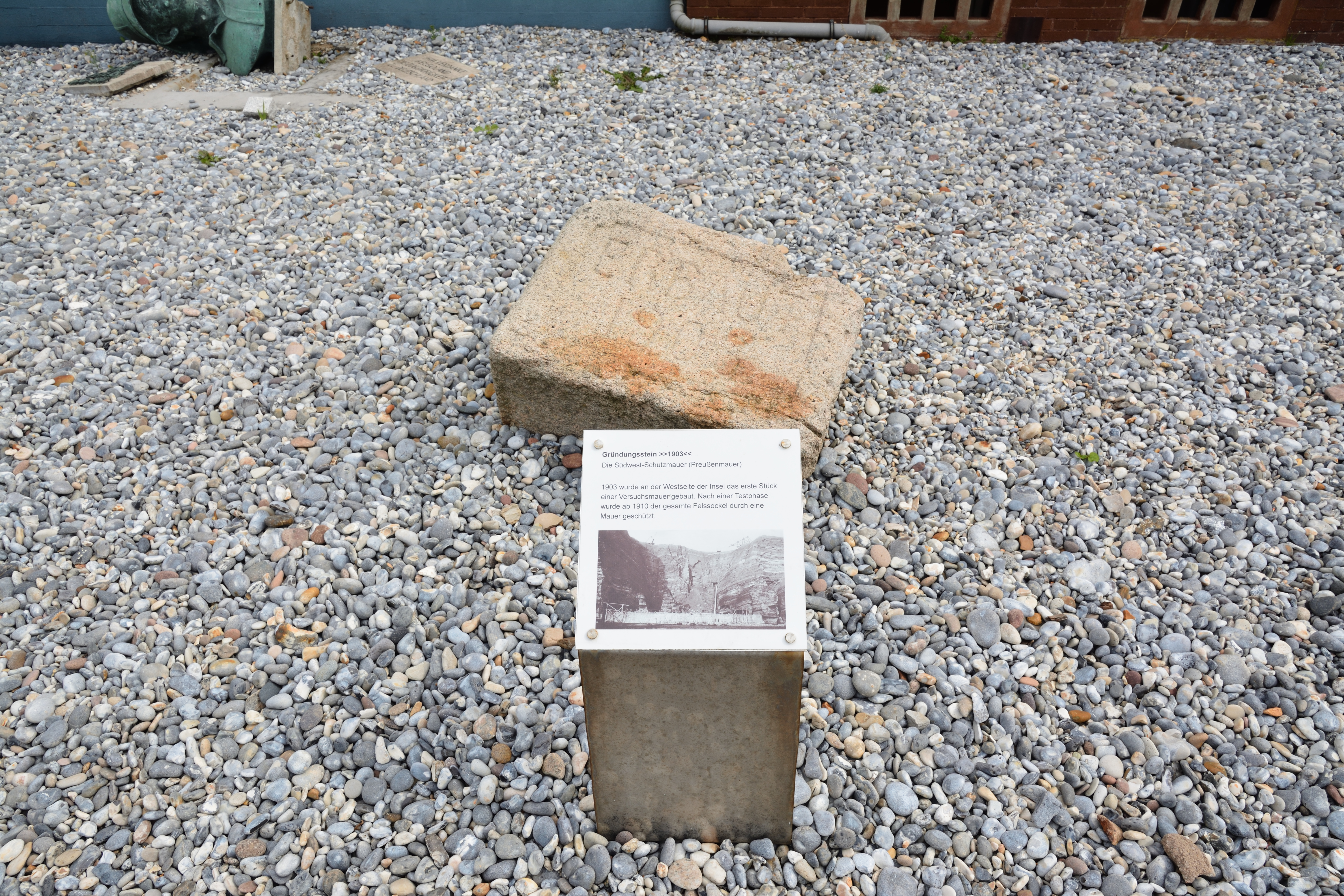 Bilder von Helgoland im Juli 2019Museum Helgoland: Aussengelände: Reste der "Preußenmauer"